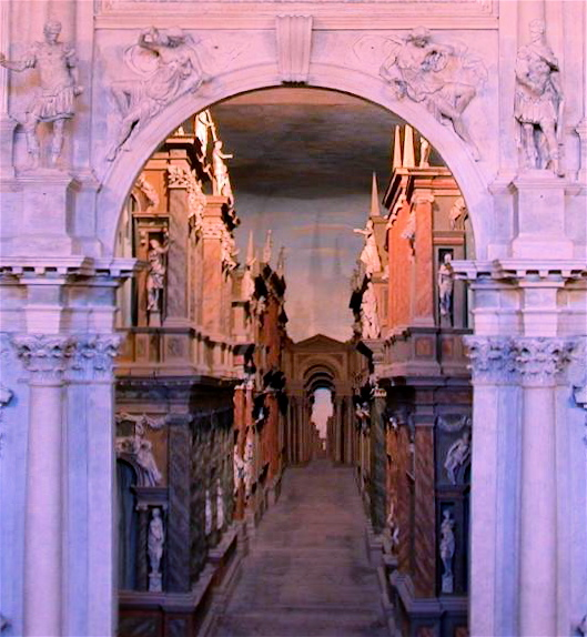 Vicenza, Teatro Olimpico, XVI secolo. Le scene lignee di Vincenzo Scamozzi visibile oltre la porta regia del proscenio.